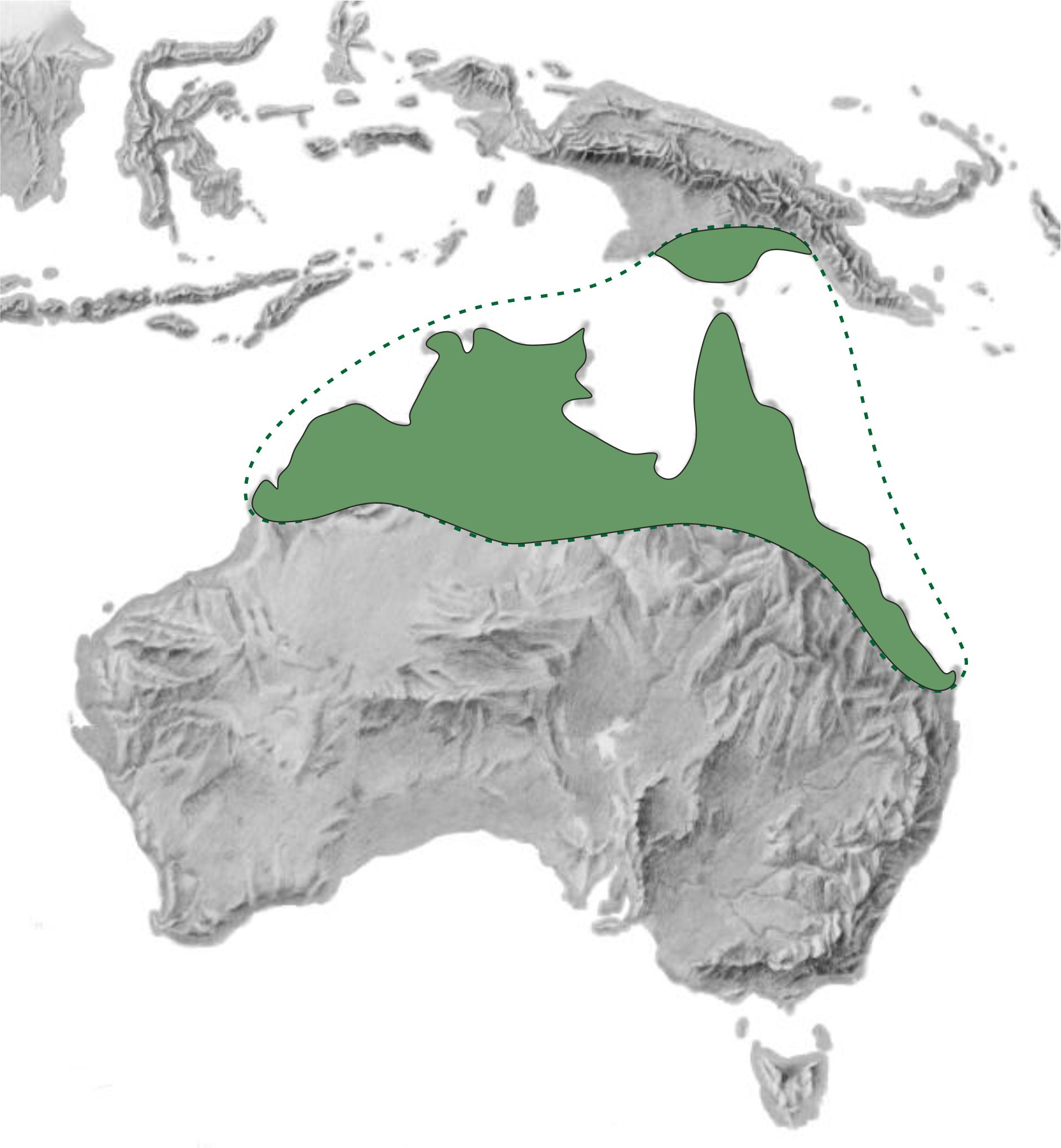 Distribution de Melaleuca viridiflora (fond dans le domaine public Kenneth Townsend), d'après Craven, 2003